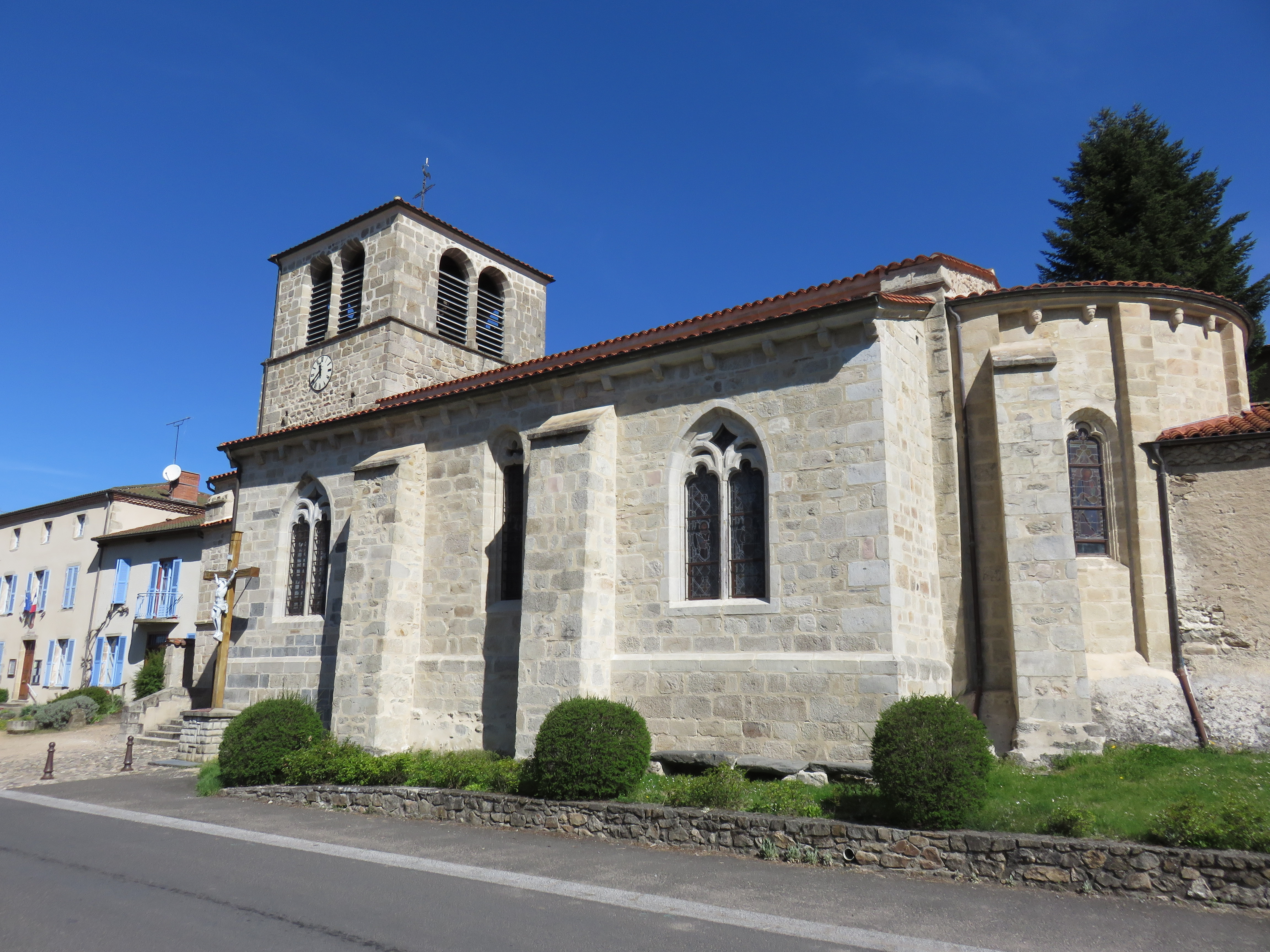 Église Sainte-Marguerite de Beurières à Beurières (Puy-de-Dôme, France).